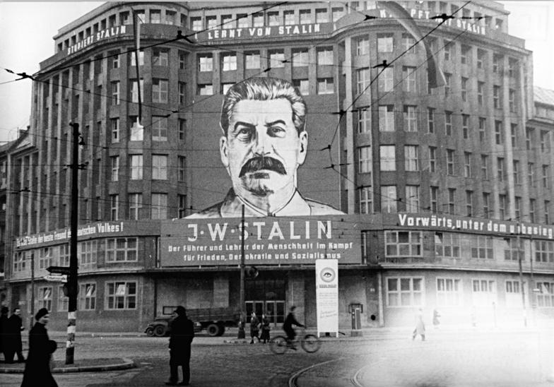 ADN-ZB / Funck / 21.12.1949 / Hö / 21.12.1949 Zum 70.Geburtstag von J.W Stalin Das anläßlich des 70. Geburtstages von J.W. Stalin festlich geschmückte "Haus der Einheit" des Zentralsekretariats der SED in Berlin in der Lothringer Str. (heute Wilhelm-Pieck-Str.)